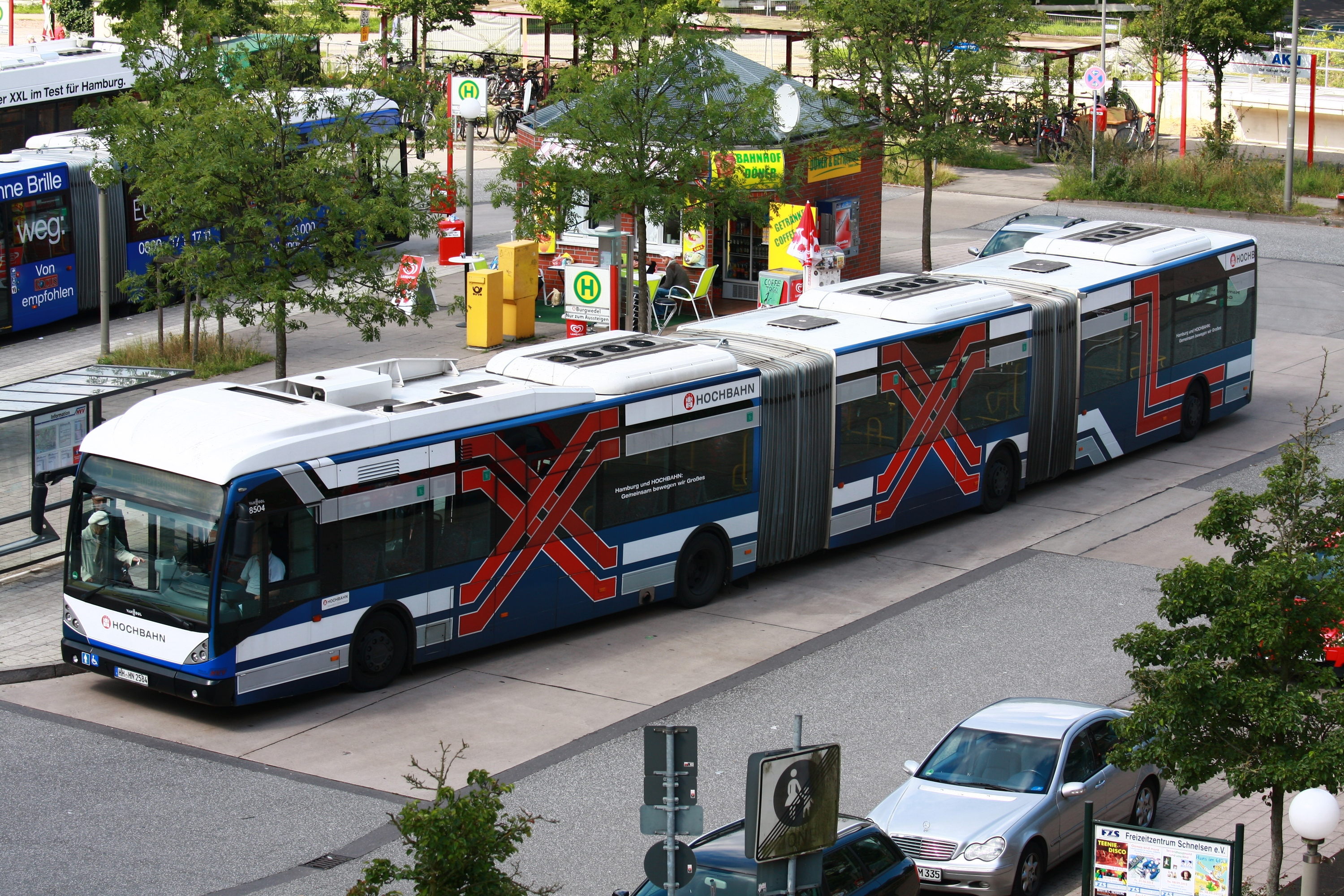 Doppelgelenkbus Van Hool AGG300 als Metrobus-Linie 5 der Hamburger Hochbahn AG in Hamburg, Haltestelle Burgwedel